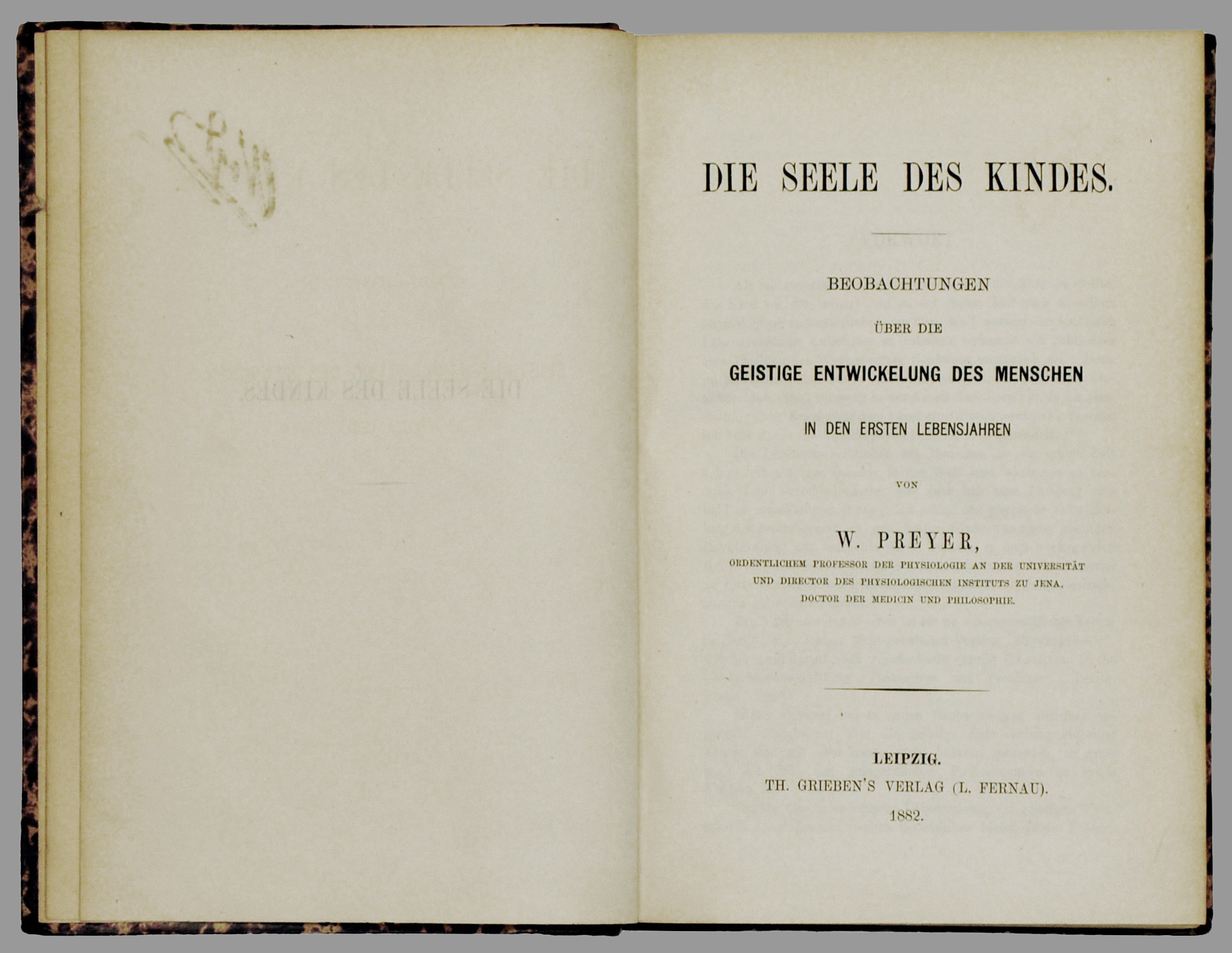 Preyer, W. : Die Seele des Kindes. Beobachtungen über die geistige Entwicklung des Menschen in den ersten Lebensjahren. Leipzig: T. Grieben (L. Fernau) 1882, Erstdruck. Sammlung H.-P.Haack → Antiquariat Dr. Haack Leipzig